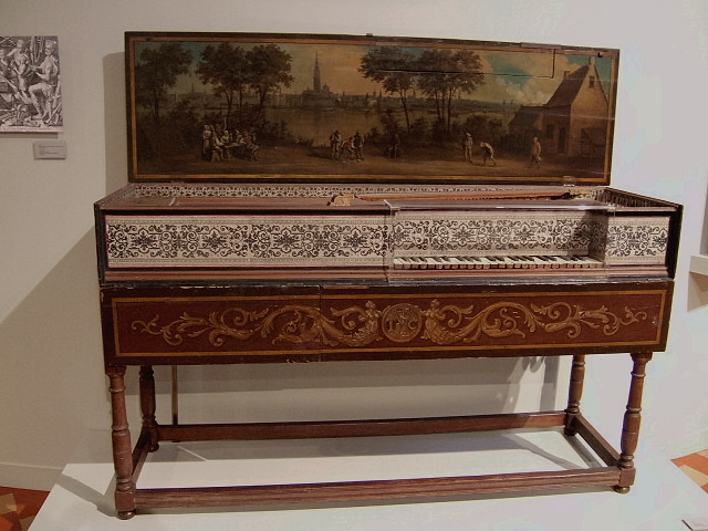 Muselaar (6-voet) par Ioannes Couchet (Anvers, 1650) - Anvers, Vleeshuis Museum